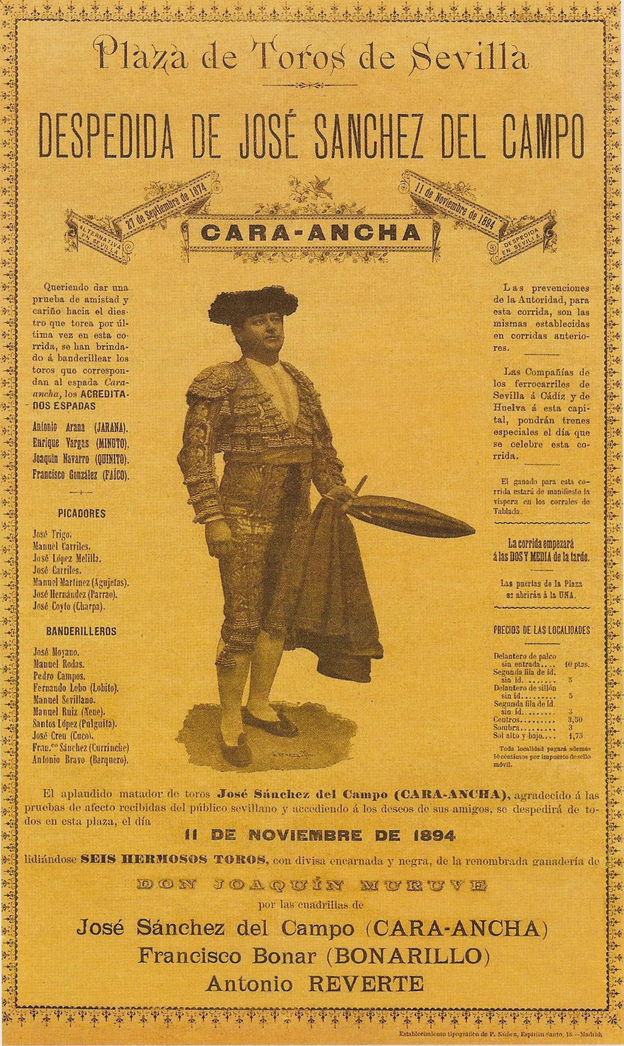 Cartel para la despedida del torero Cara-Ancha en Sevilla.